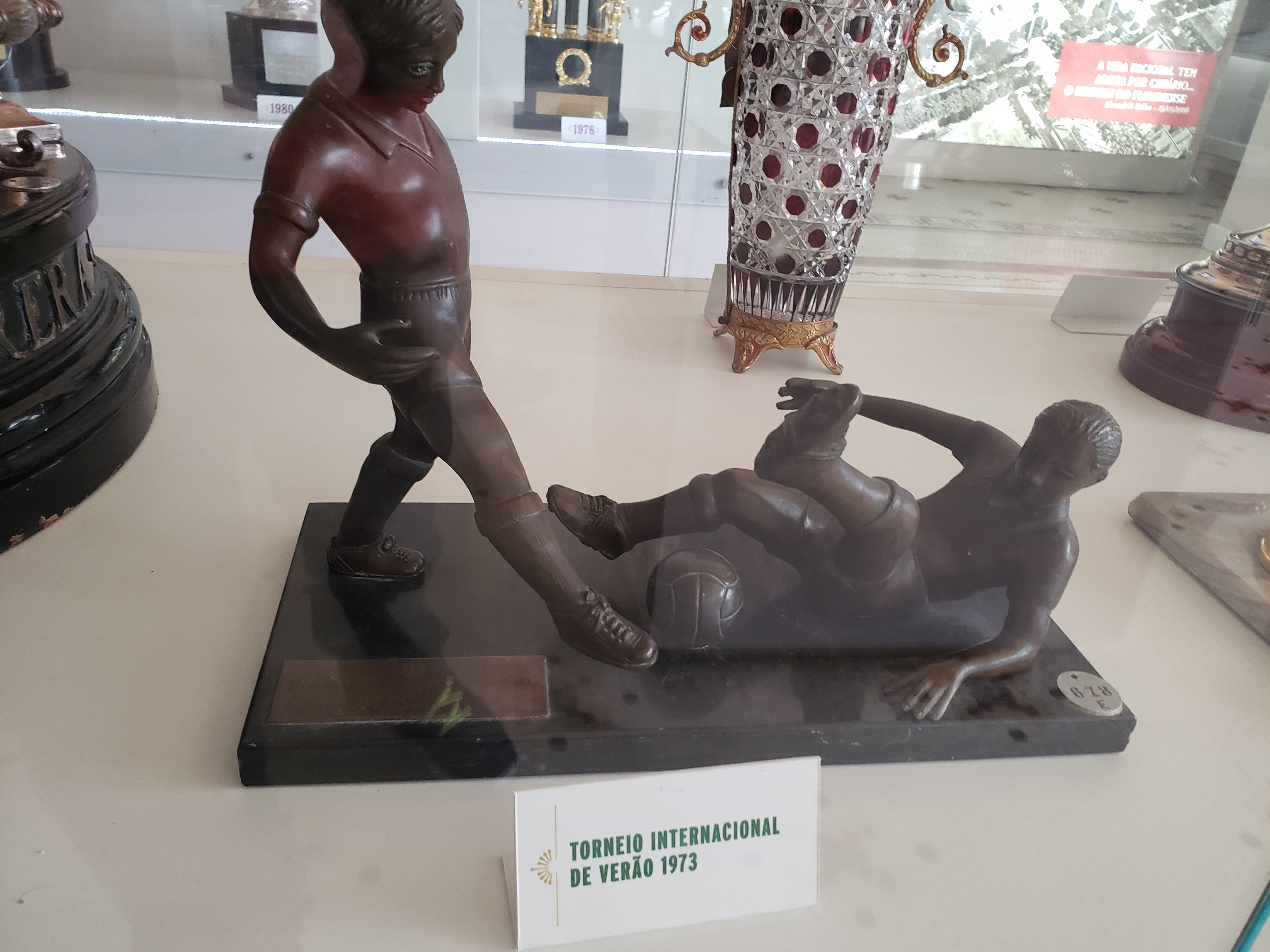 Torneio Internacional de Verão do Rio de Janeiro de 1973, conquistado pelo Fluminense Football Club.